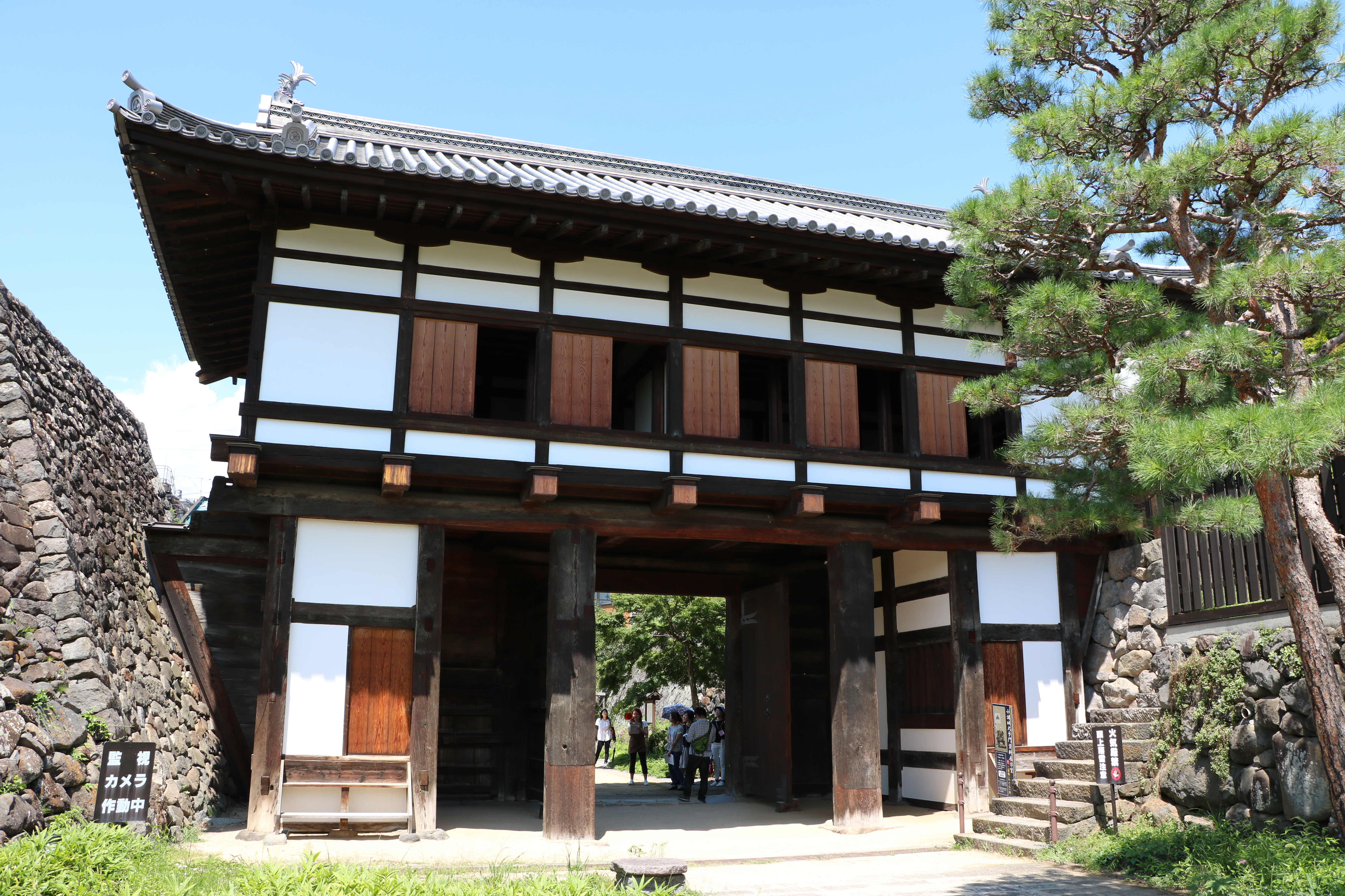 小諸城大手門表側（長野県小諸市）